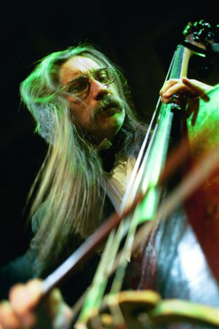 Bogdan Mizerski (b. 1955), Polish musician